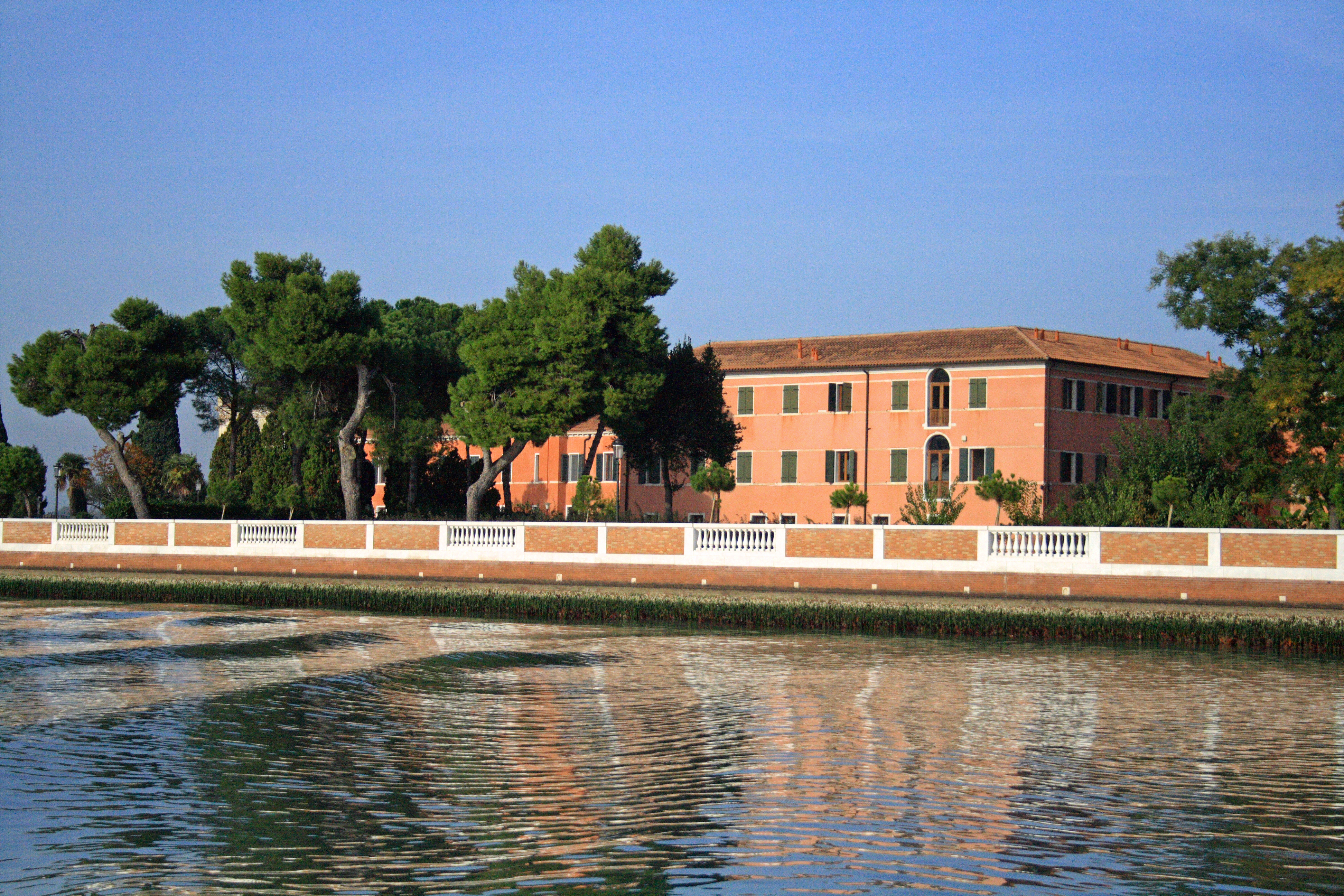 L'isola di San Lazzaro degli Armeni a Venezia